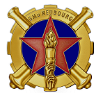 Héraldique Canons de bronze en sautoir, bordé d’une roue crénelée de même sur douze dents d’engrenages, alésée en son abime d’un tourteau d’azur chargé d’une étoile de gueules chargé d’une flamme olympique de bronze. Symbole La roue dentée et les deux canons en sautoirs sont le symbole de l’artillerie moderne, mécanisée. L’étoile chérifienne représente le Maroc, province où fut fondé le régiment, sa couleur écarlate sur fond bleu représente les deux couleurs originelles de l’artillerie et toutes les spécialités qui en sont issues. Le flambeau représente la maîtrise du feu, de la poudre, en lien direct avec le savoir-faire perpétué par les artificiers depuis leurs origines.